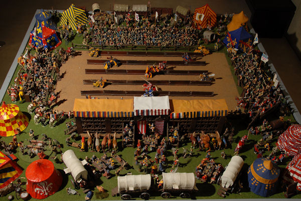 Modell eines französischen Ritterturniers in 1:25